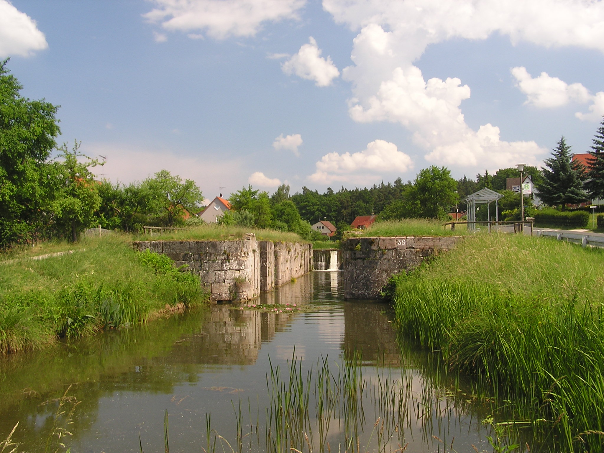 Der Ludwigskanal im Schwarzenbrucker Ortsteil Pfeifferhütte